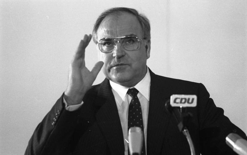 03.02.1983 Friedenskongreß der CDU im Konrad-Adenauer-Haus, Bonn.